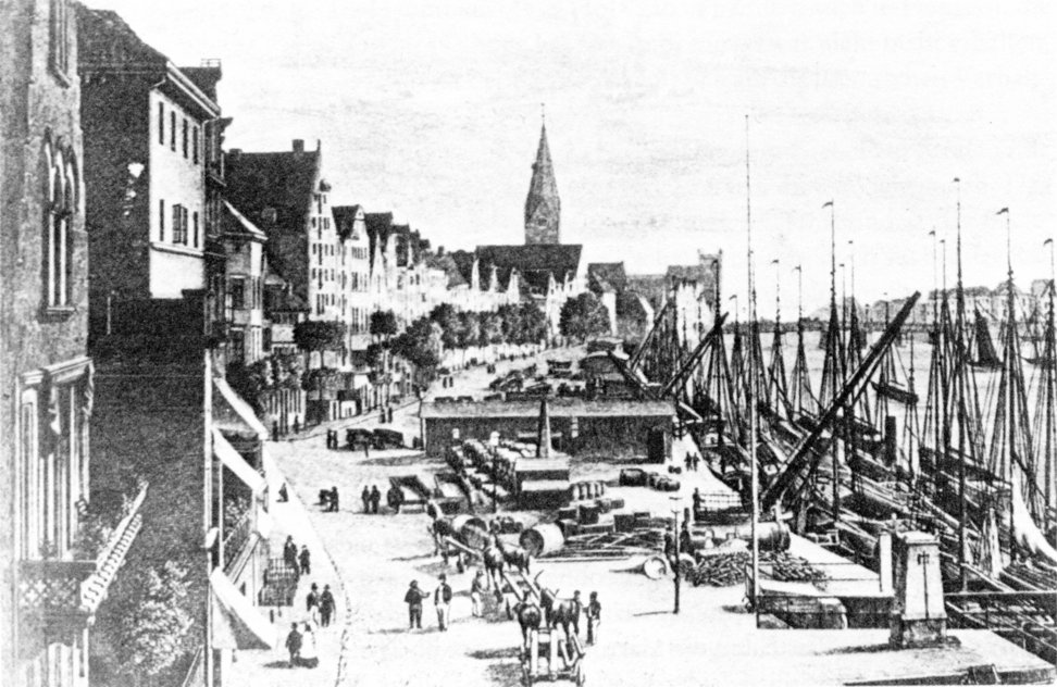 Bremen, Blick auf die Schlachte, um 1862, Lithographie von Robert Hüser. Zwischen die Packhäuser mischt sich schon Wohnbebauung. Einige Jahre später wird der Hafenbetrieb an der Schlachte eingestellt und in die flussabwärts gelegenen, neu gebauten Häfen verlagert werden.